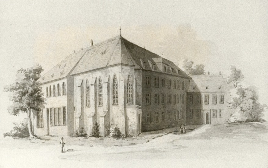 Ce couvent, créé en 1474, accueilla notamment Martin Bucer. Coll. Kurpfälzisches Museum Heidelberg